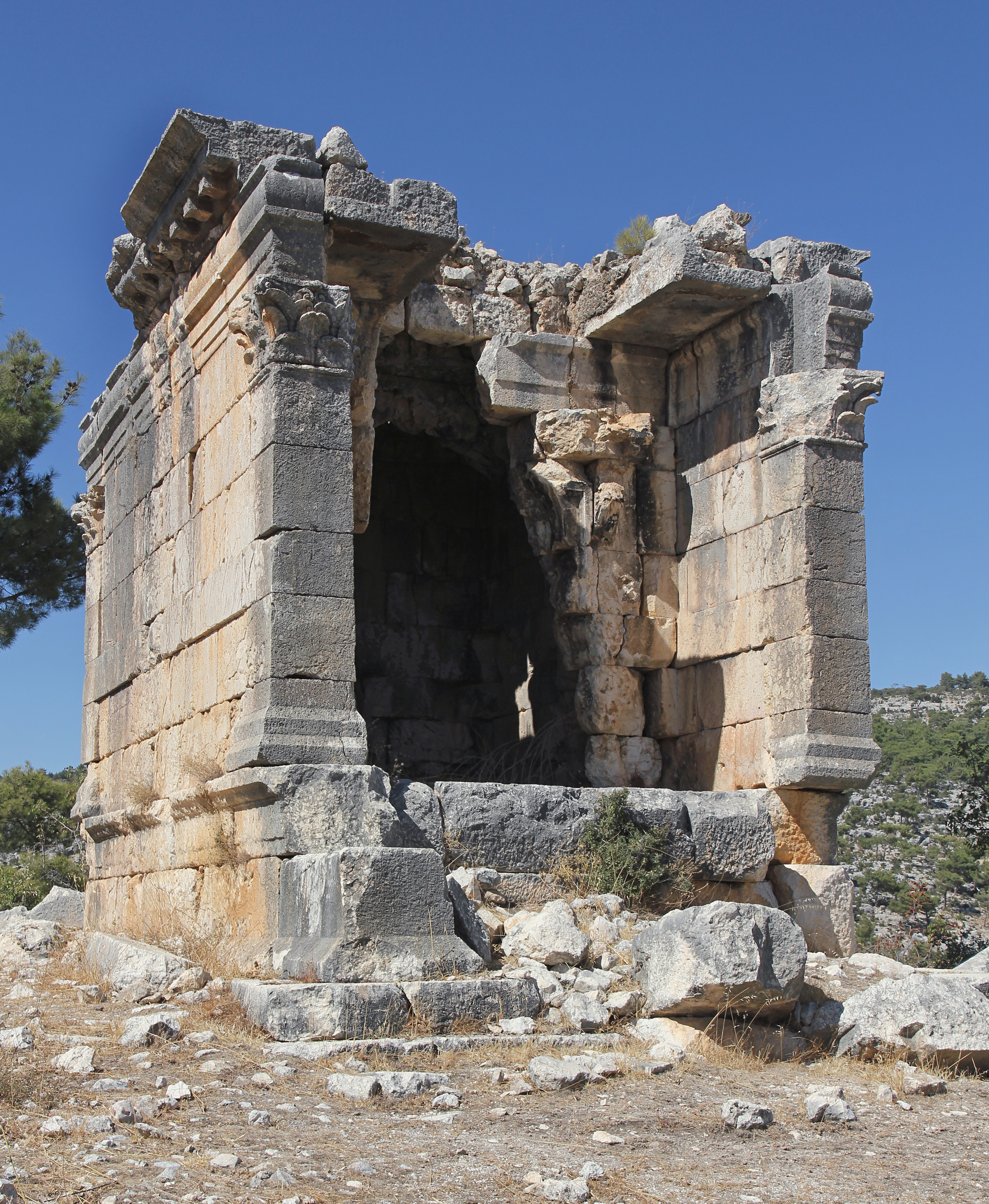 Karaböcülü, römisch-frühbyzantinische Siedlung im Rauhen Kilikien, Südtürkei, Tempelgrab